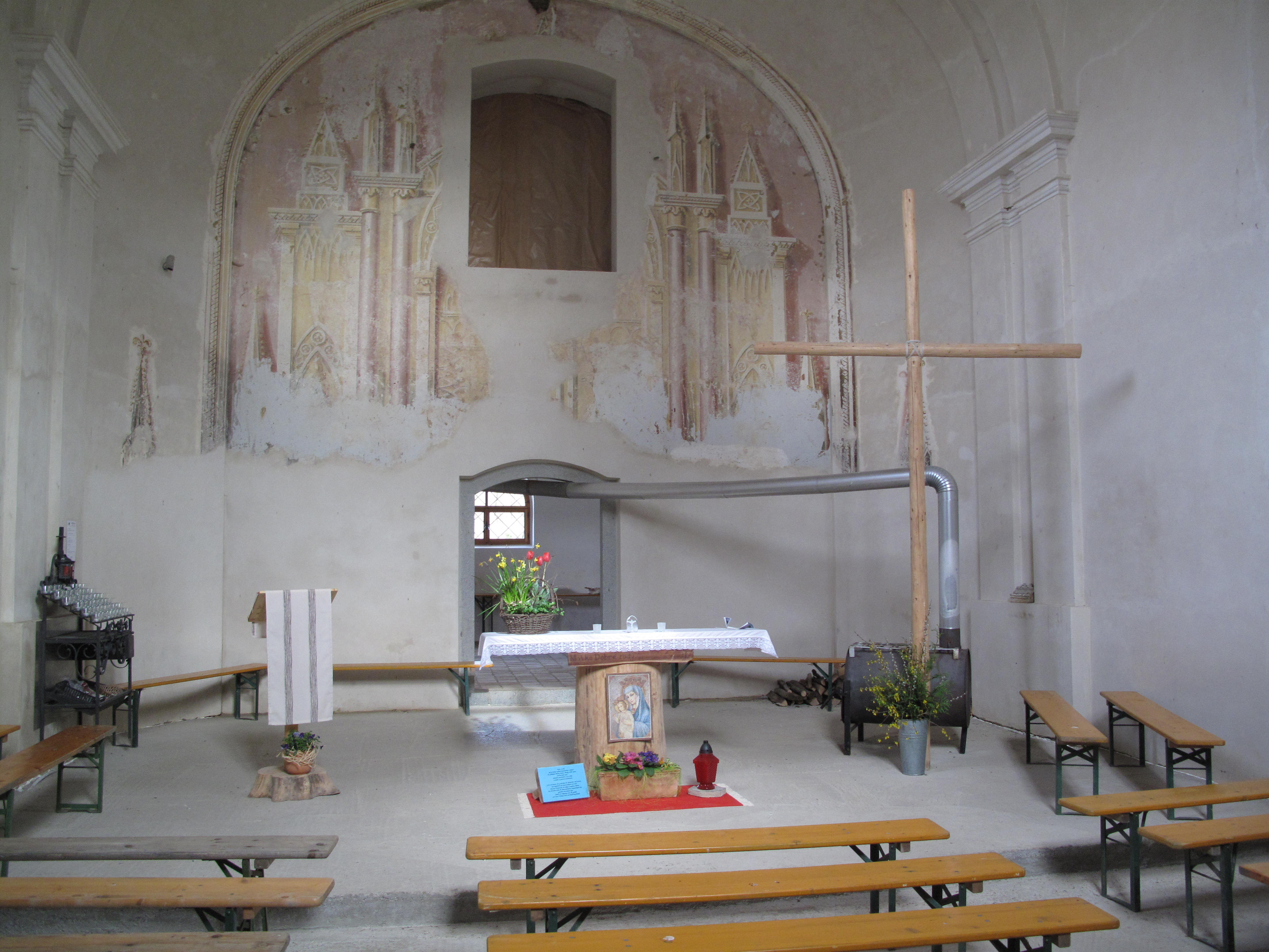 Pohoří na Šumavě, kostel